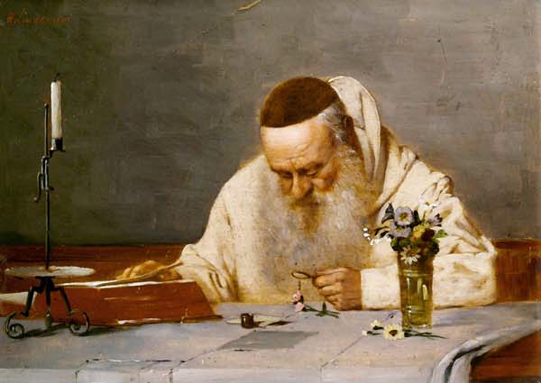 Sitzender Mönch-Botaniker. Öl auf Karton, signiert, 20 x 27 cm